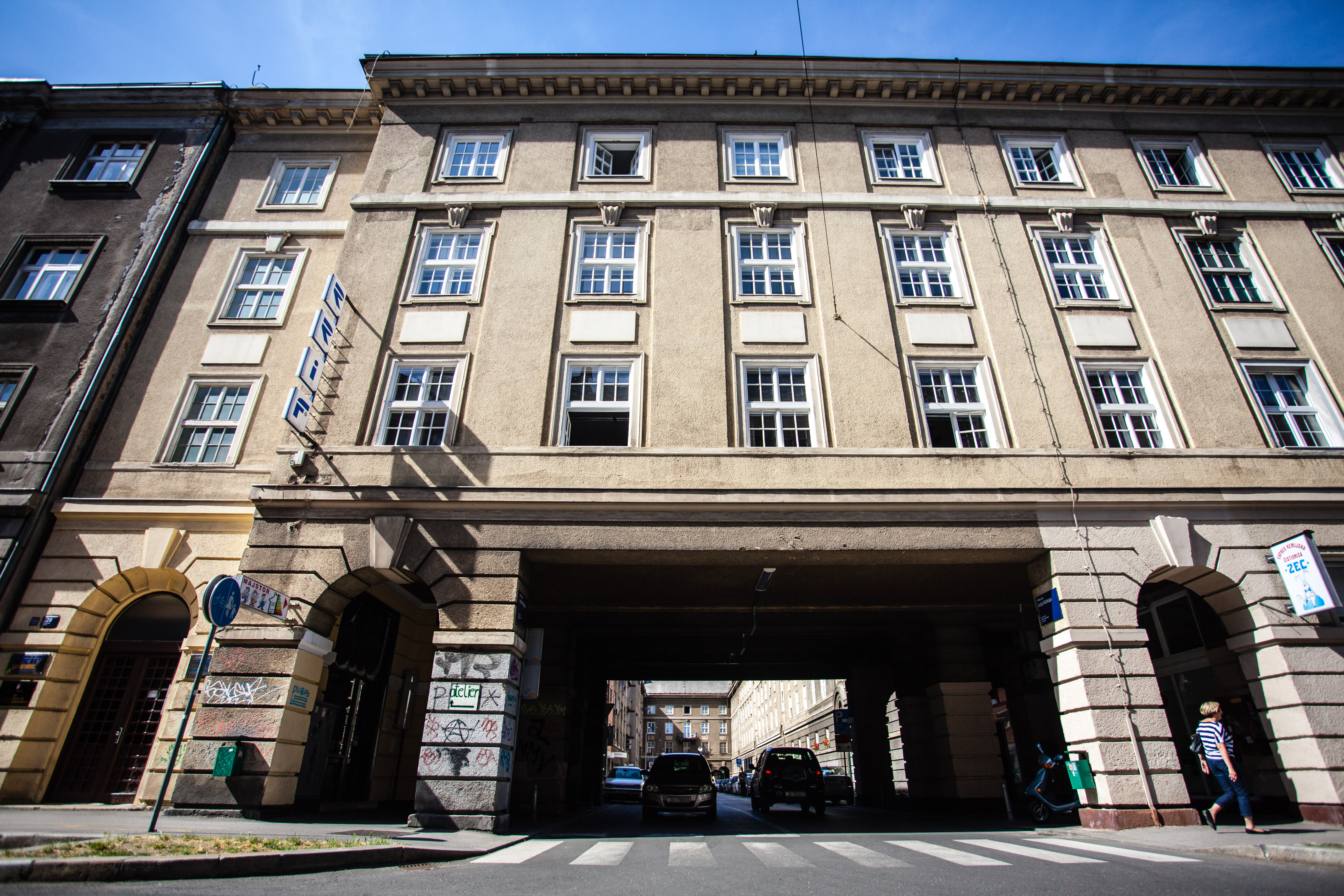 sjedište RRiF VŠ